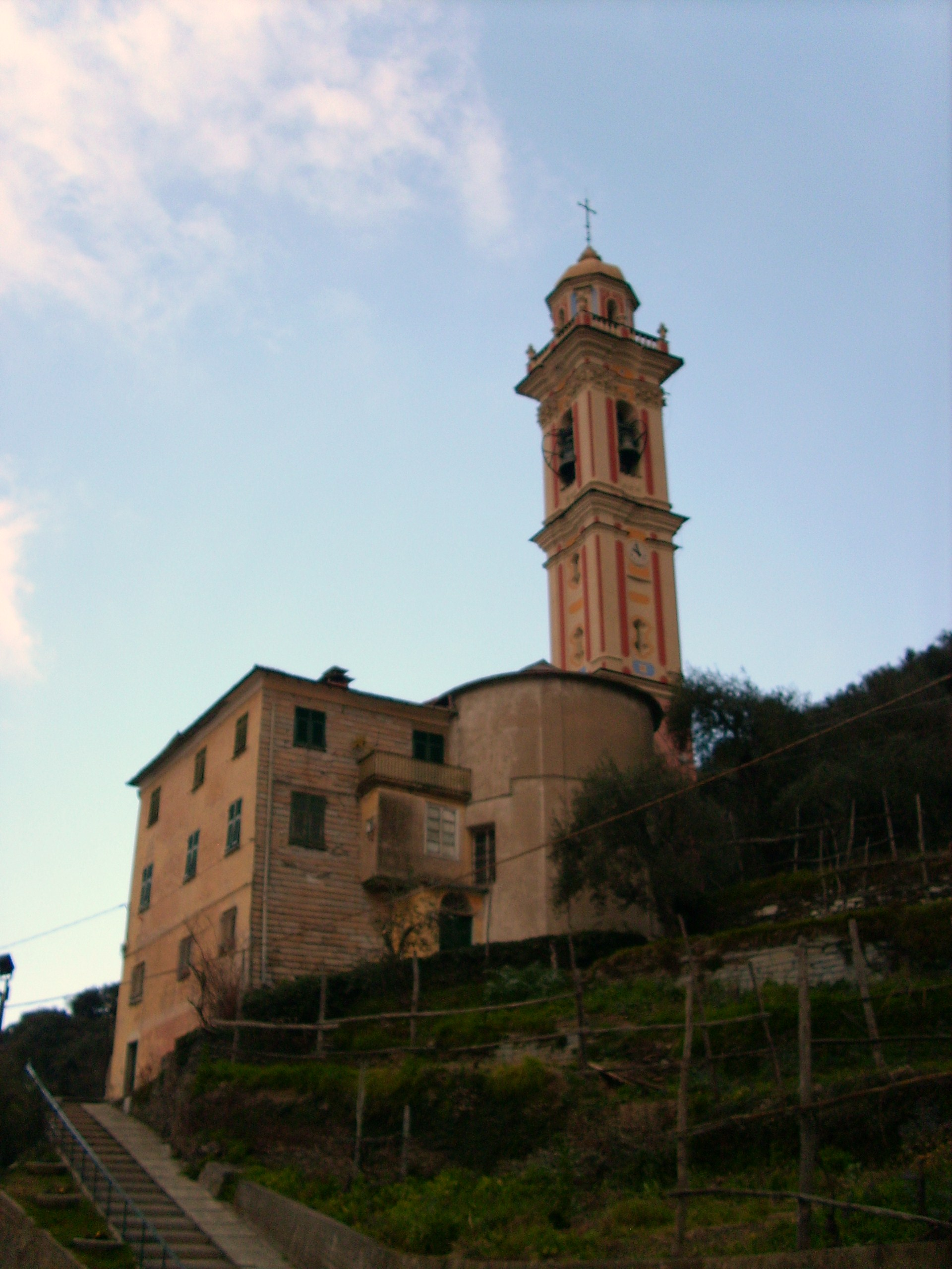 Campanile della chiesa di Sant'Antonino martire, Breccanecca, Cogorno, Liguria, Italy